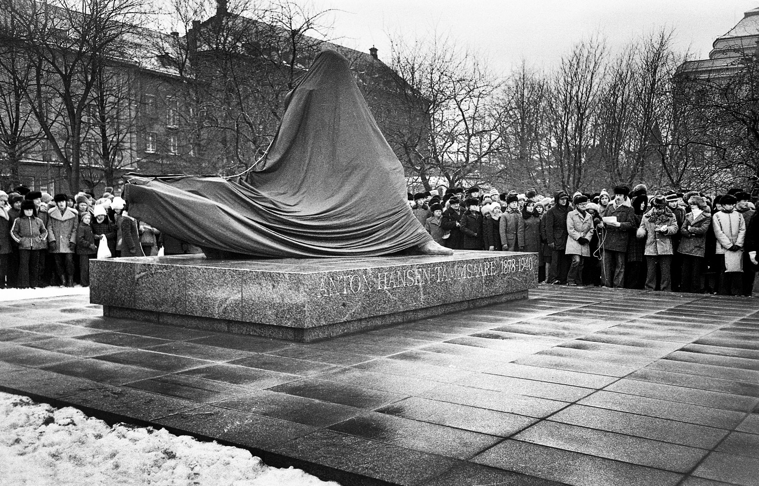 A. H. Tammsaare monumendi avamine 78 (03)